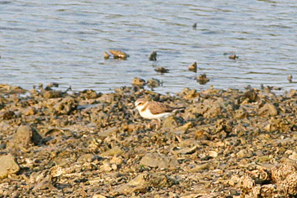 Javan Plover Charadrius javanicus, Bali